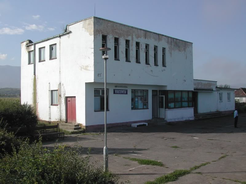 Staţia de tren din Racoviţa, Sibiu.